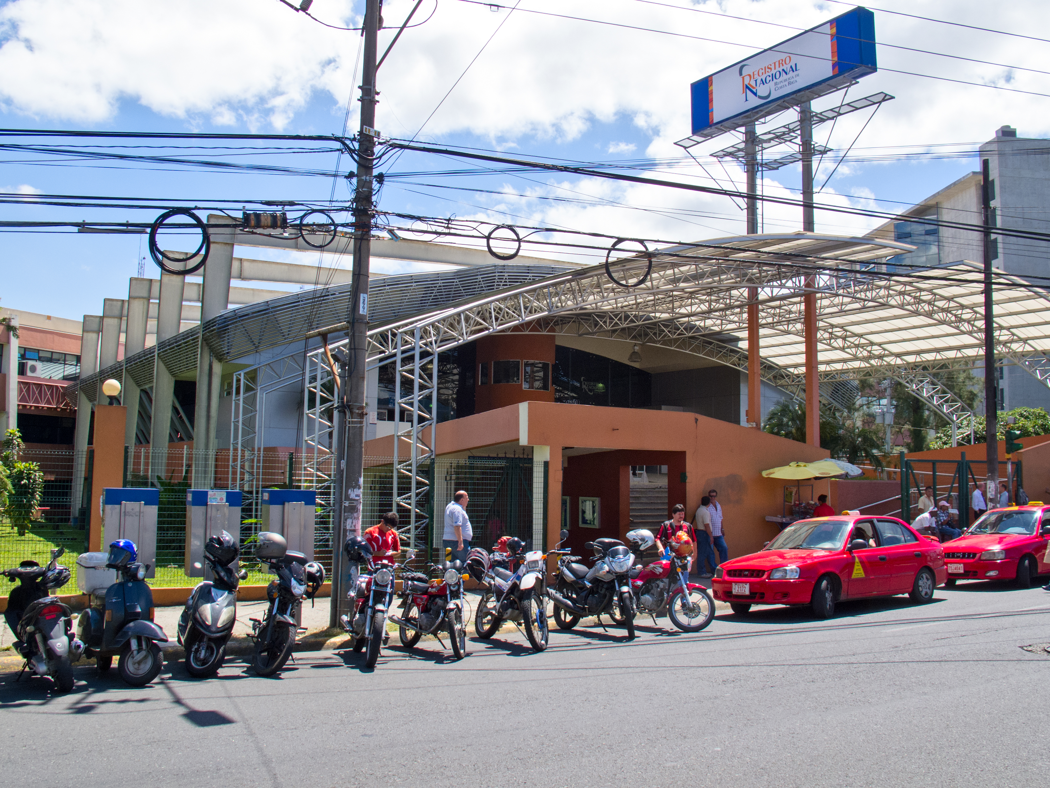 El Registro Nacional de Costa Rica, en San José